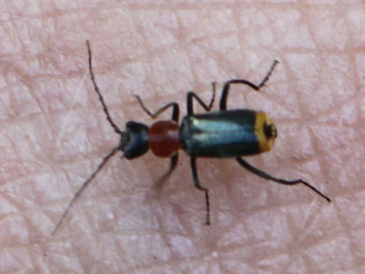 Axinotarsus ruficollis, Männchen, am 3.7.2017 in der Schwetzinger Hardt